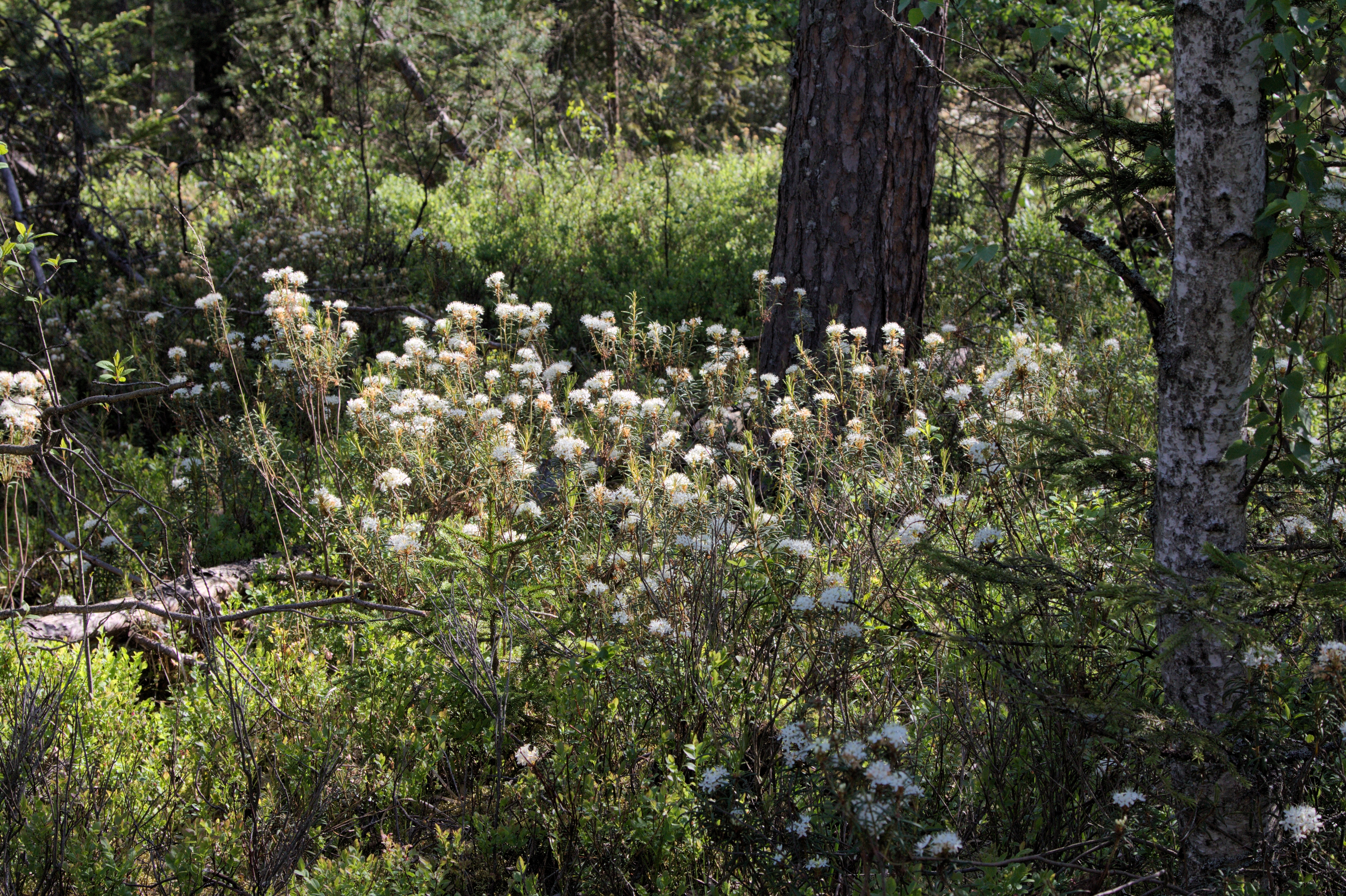 Žofinka (národní přírodní rezervace) - Ledum palustre L., rojovník bahenní - status ohrožení v ČR: C3 (ohrožený)